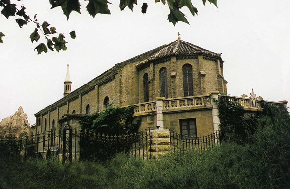 中文（中国大陆）: 原保定耶稣圣心堂附属建筑。